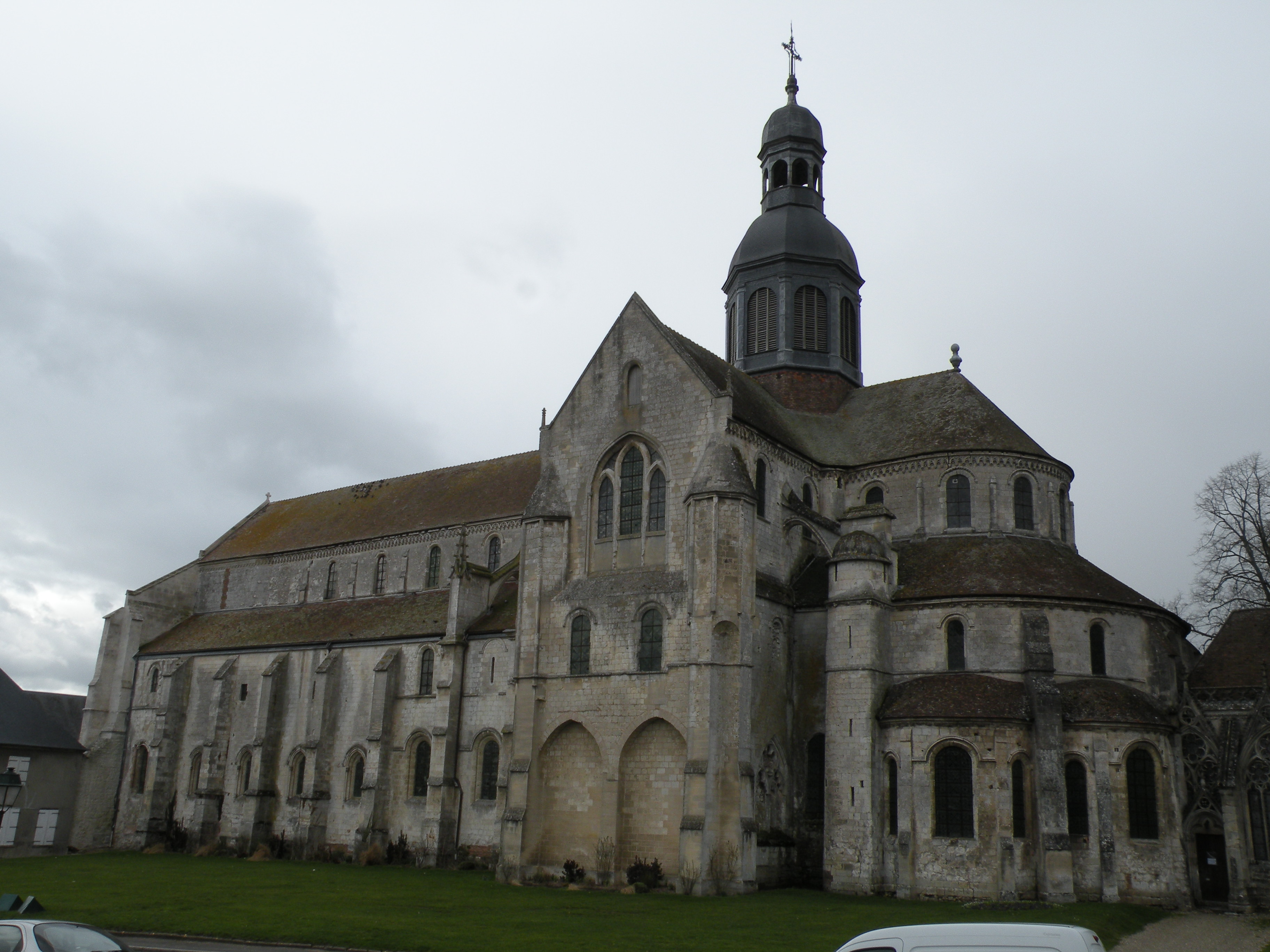 Abbaye Saint-Germer-de-Fly